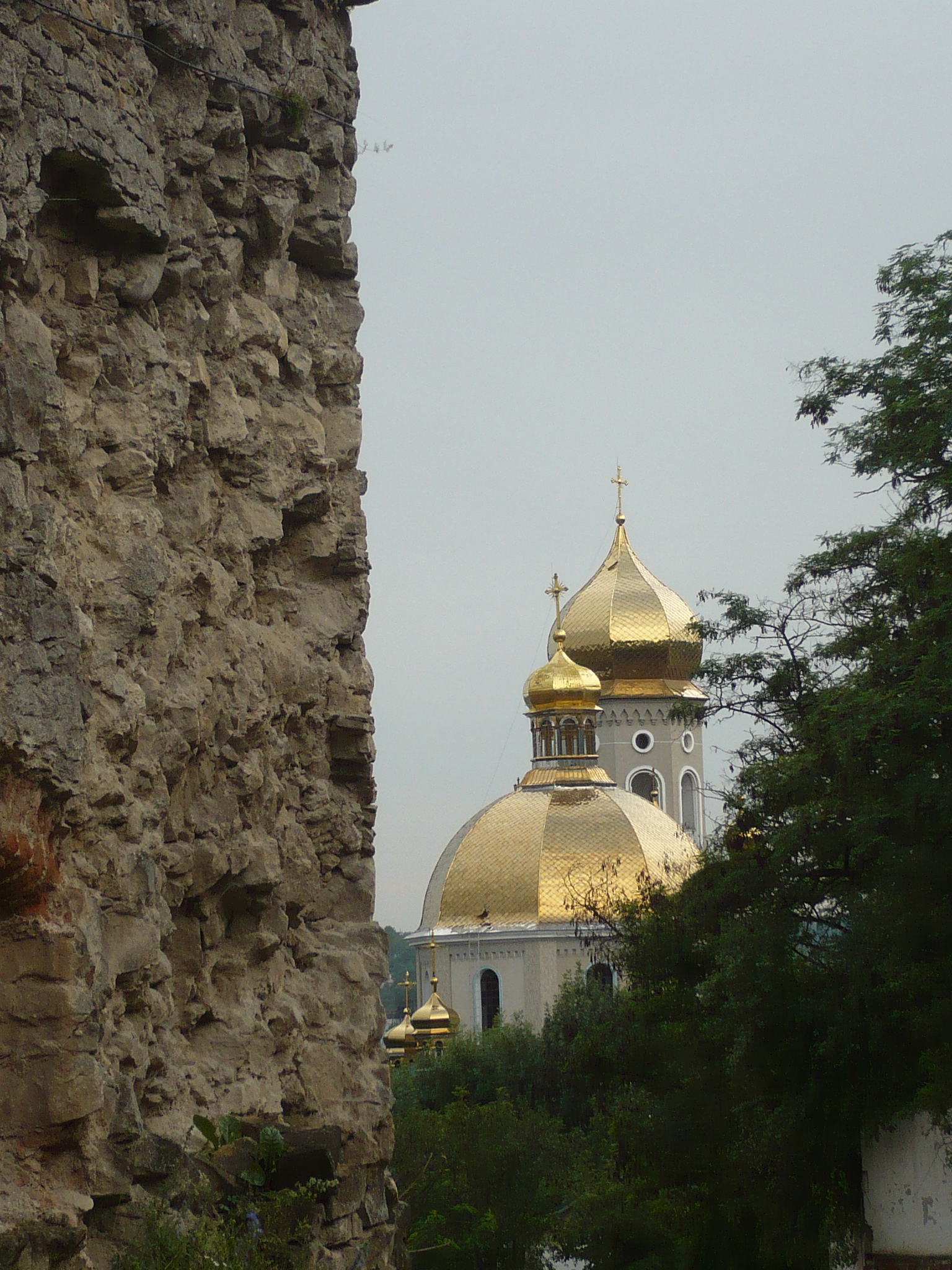 Cerkiew Zaśnięcia